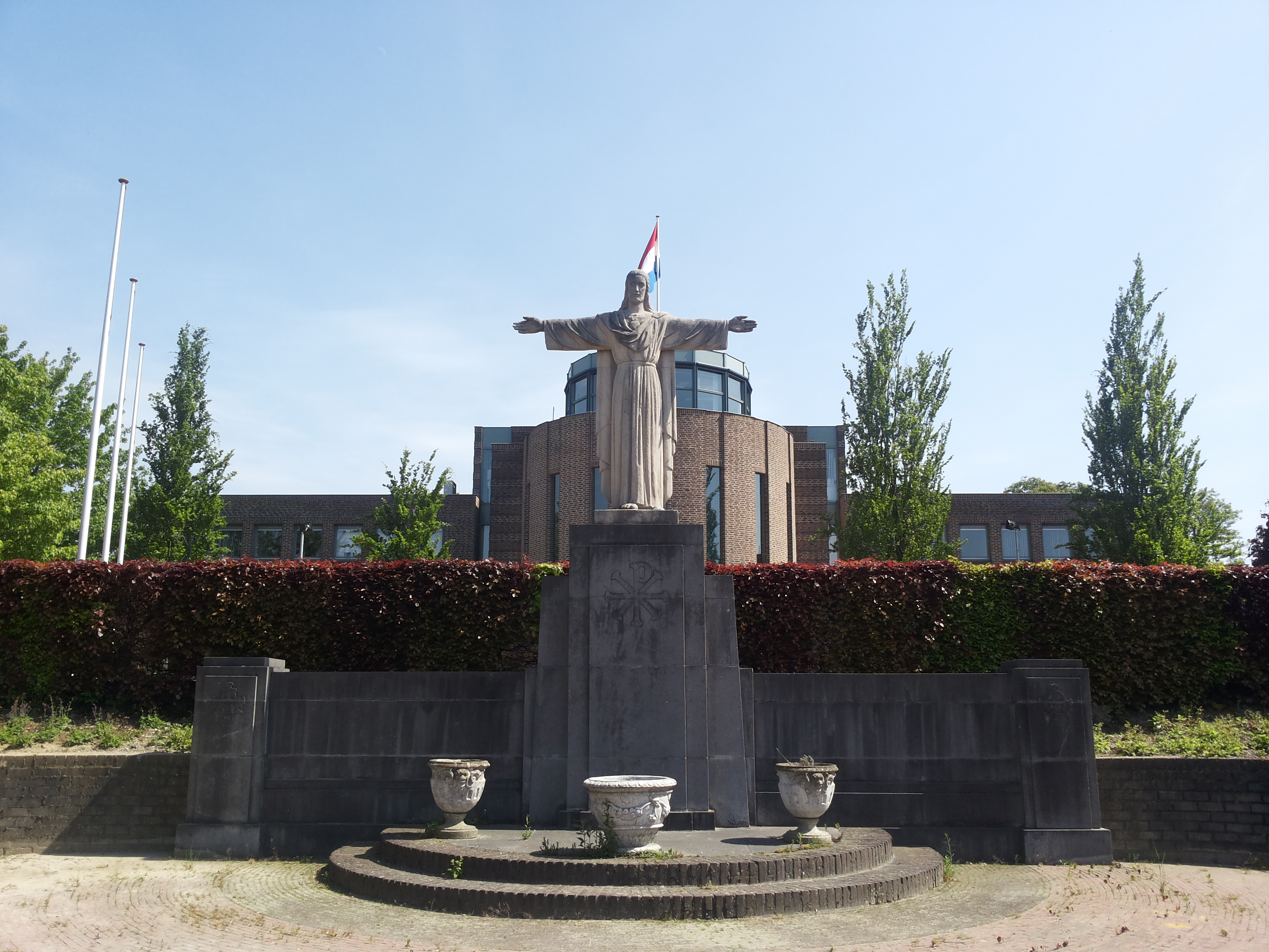 Heilig Hartbeeld Kloosterlaan-Schoolstraat in Schinveld, Limburg, Nederland